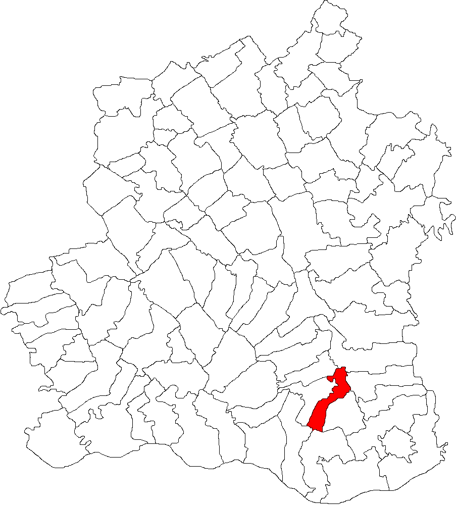 Categorie:Hărţi ale judeţului Teleorman